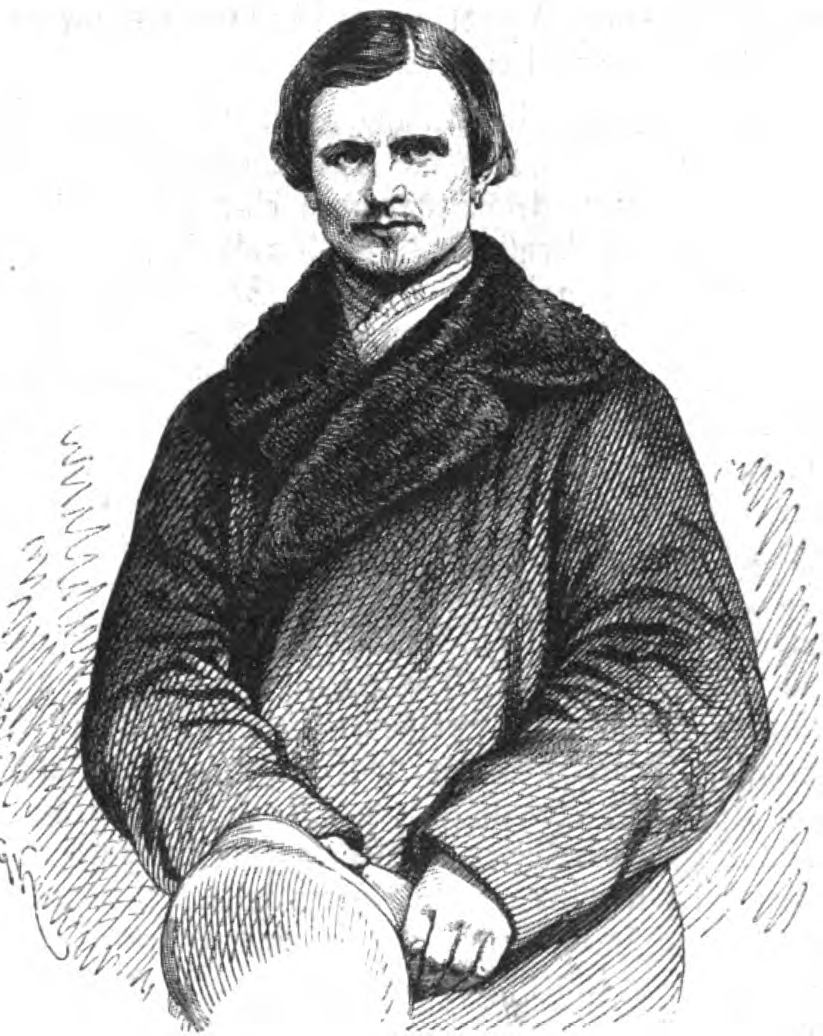 Ossip Iwanowitsch Kommissarow, russischer Bauer, Lebensretter von Zar Alexander II.